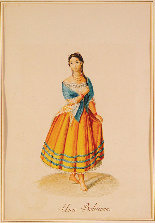 Acuarela realizada por el artista viajero francés Ernest Charton cuando vivió el Ecuador entre 1862 y 1870